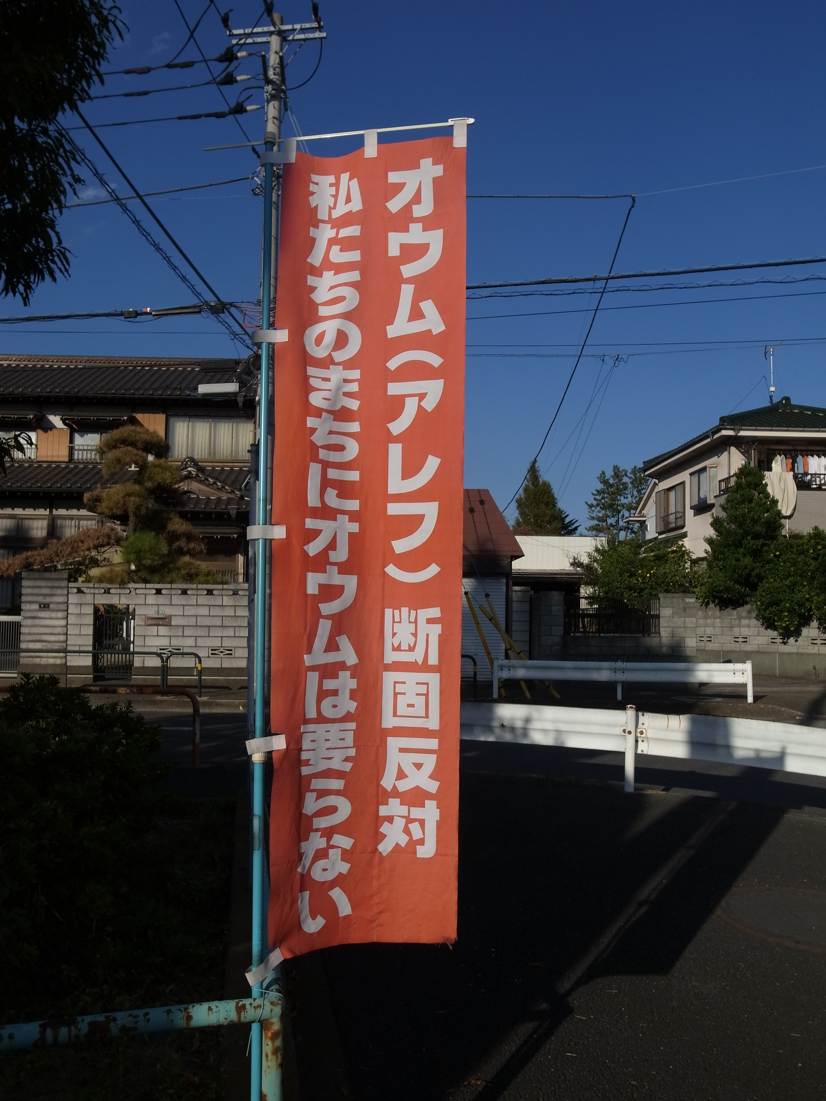 オウム真理教に反対する幟 (Anti-Aum banner)